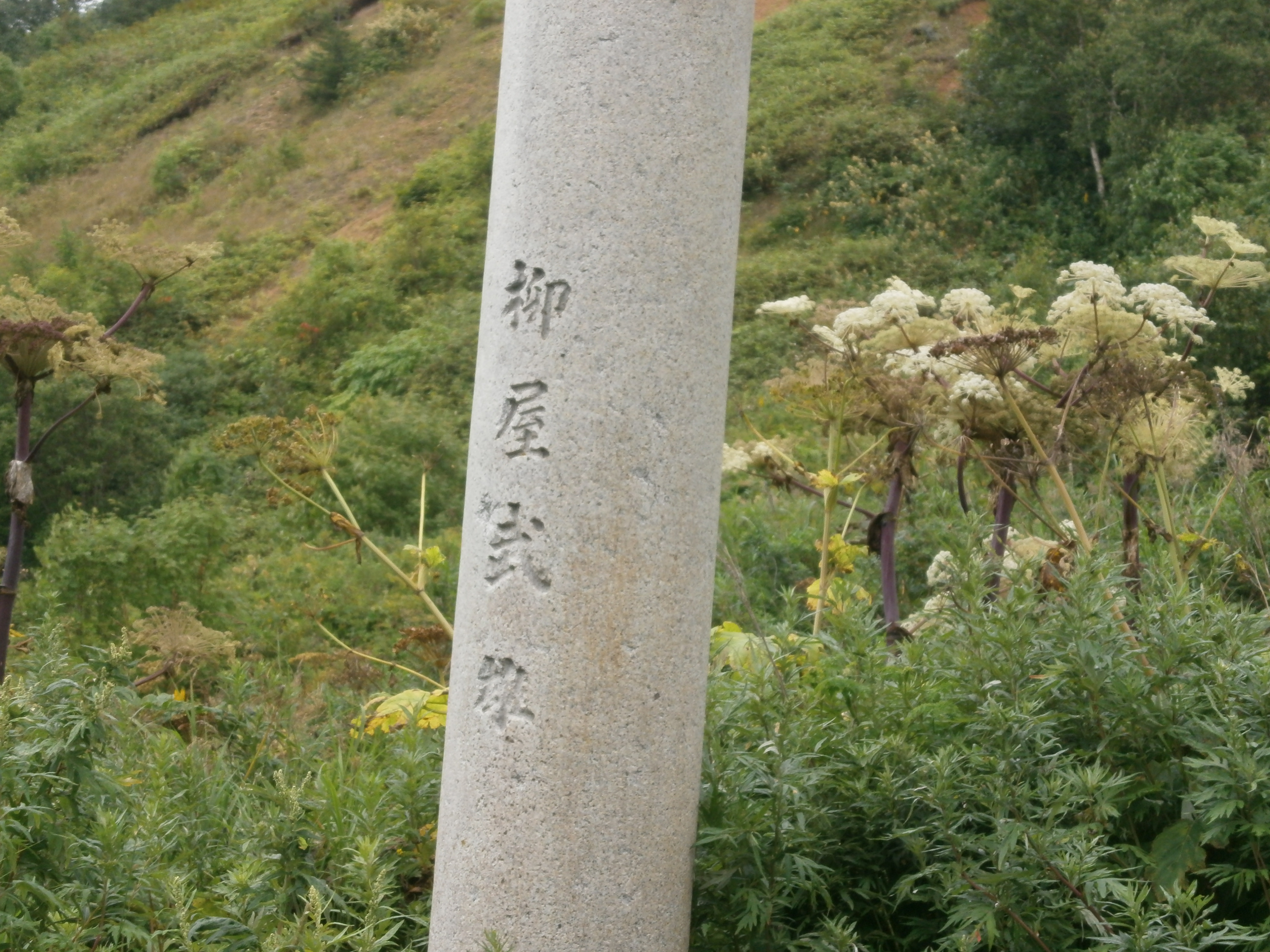 鳥居の寄贈者名